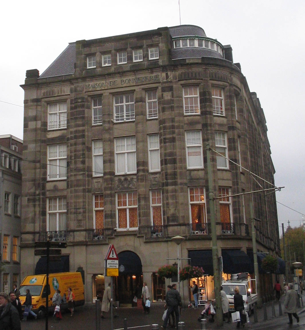 maison de bonneterie, Den Haag, Netherlands, 21 oktober 2005